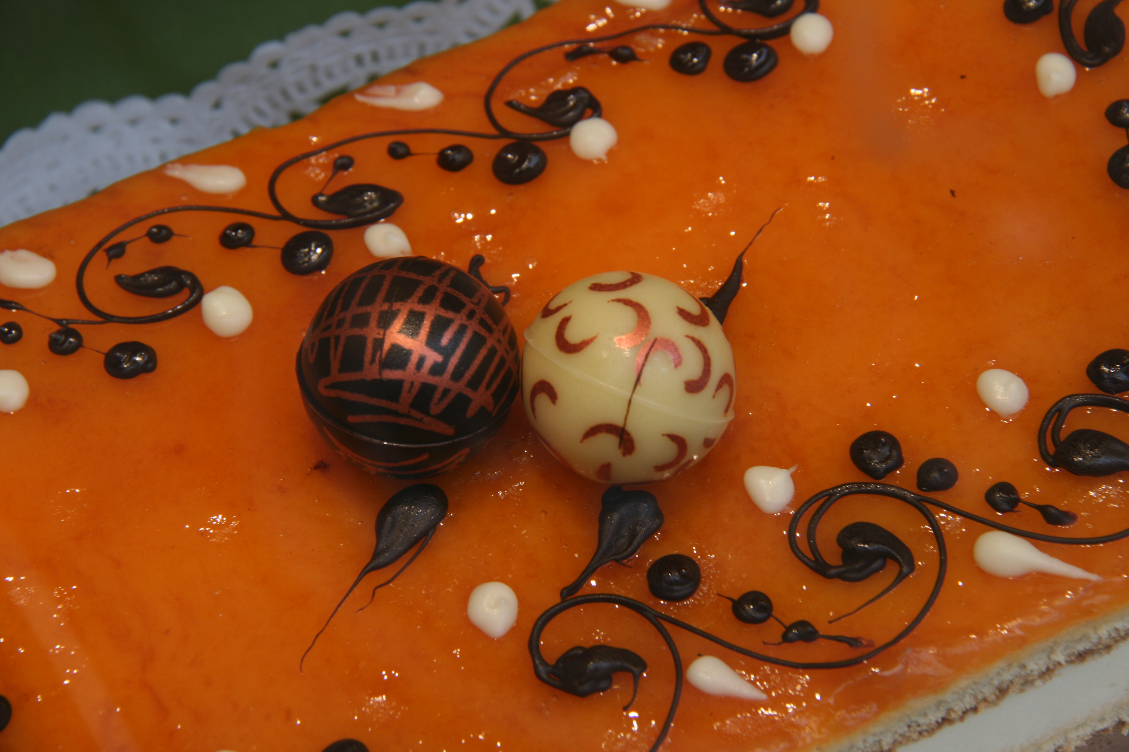 Decortación navideña de un pastel